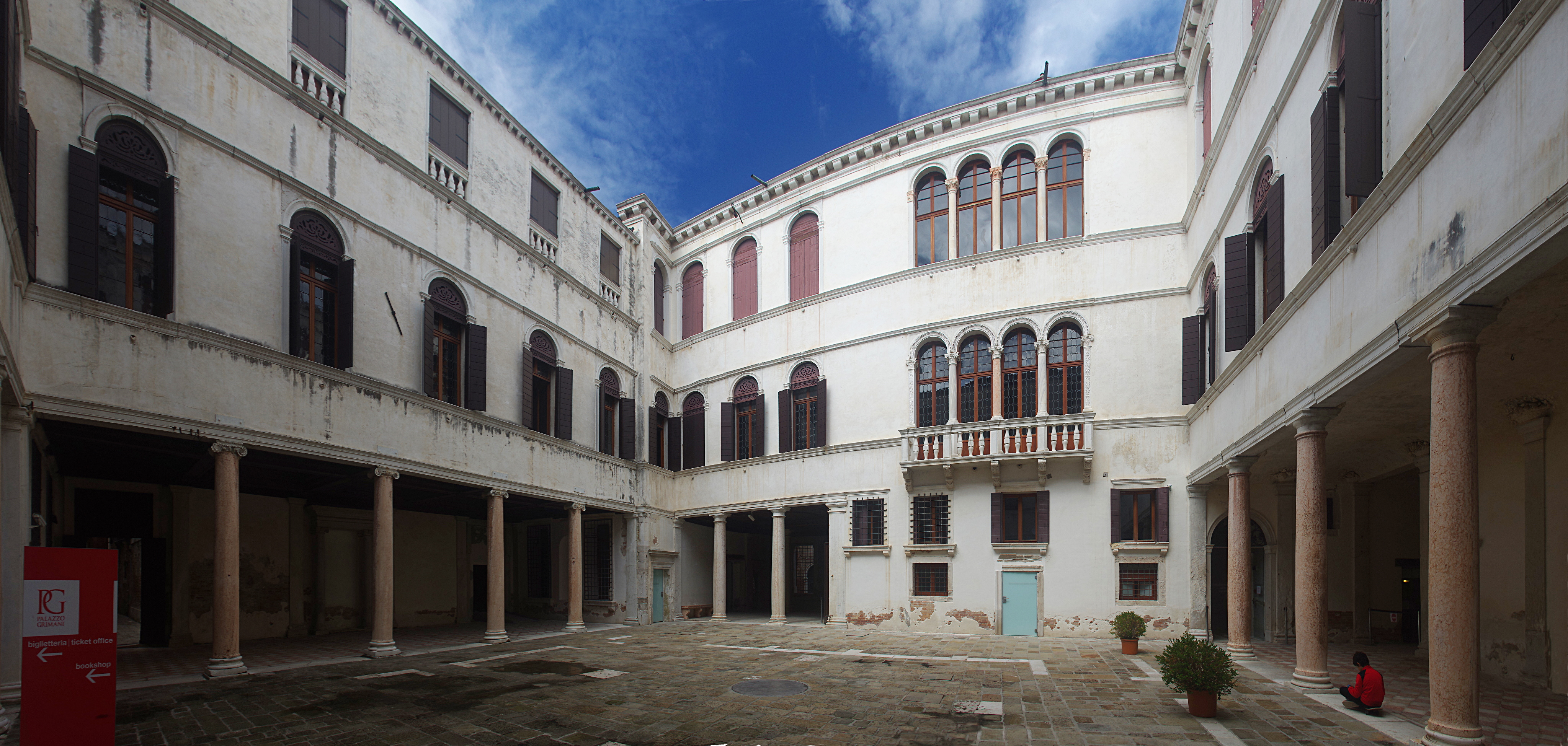 Museo di Palazzo Grimani (Castello) - MIBAC This is a photo of a monument which is part of cultural heritage of Italy.